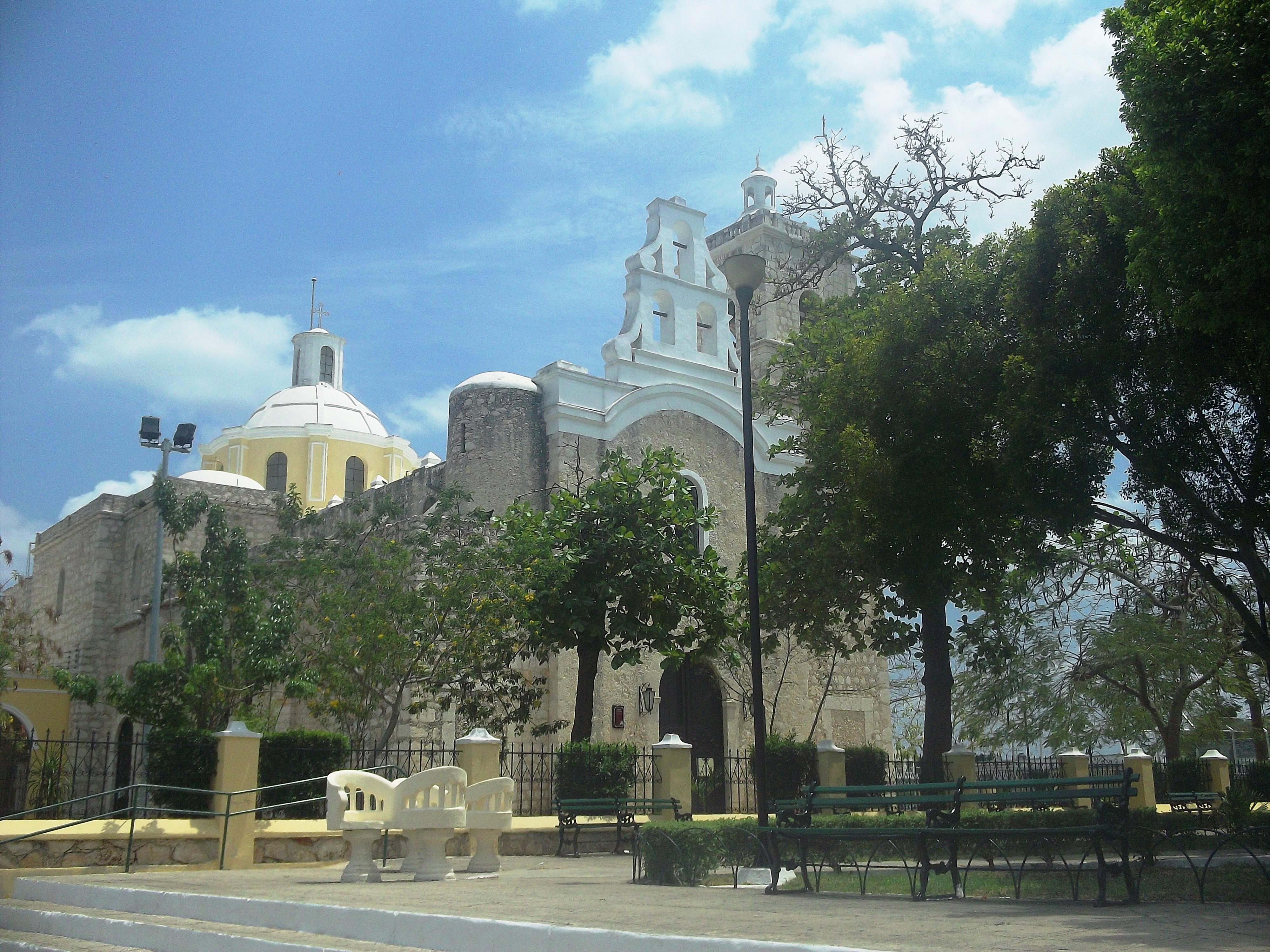 Iglesia de la 3ª Orden, Mérida, Yucatán